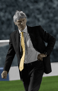 José Néstor Pékerman en el juego de clasificatoria Uruguay - Colombia, estadio Centenario de Montevideo